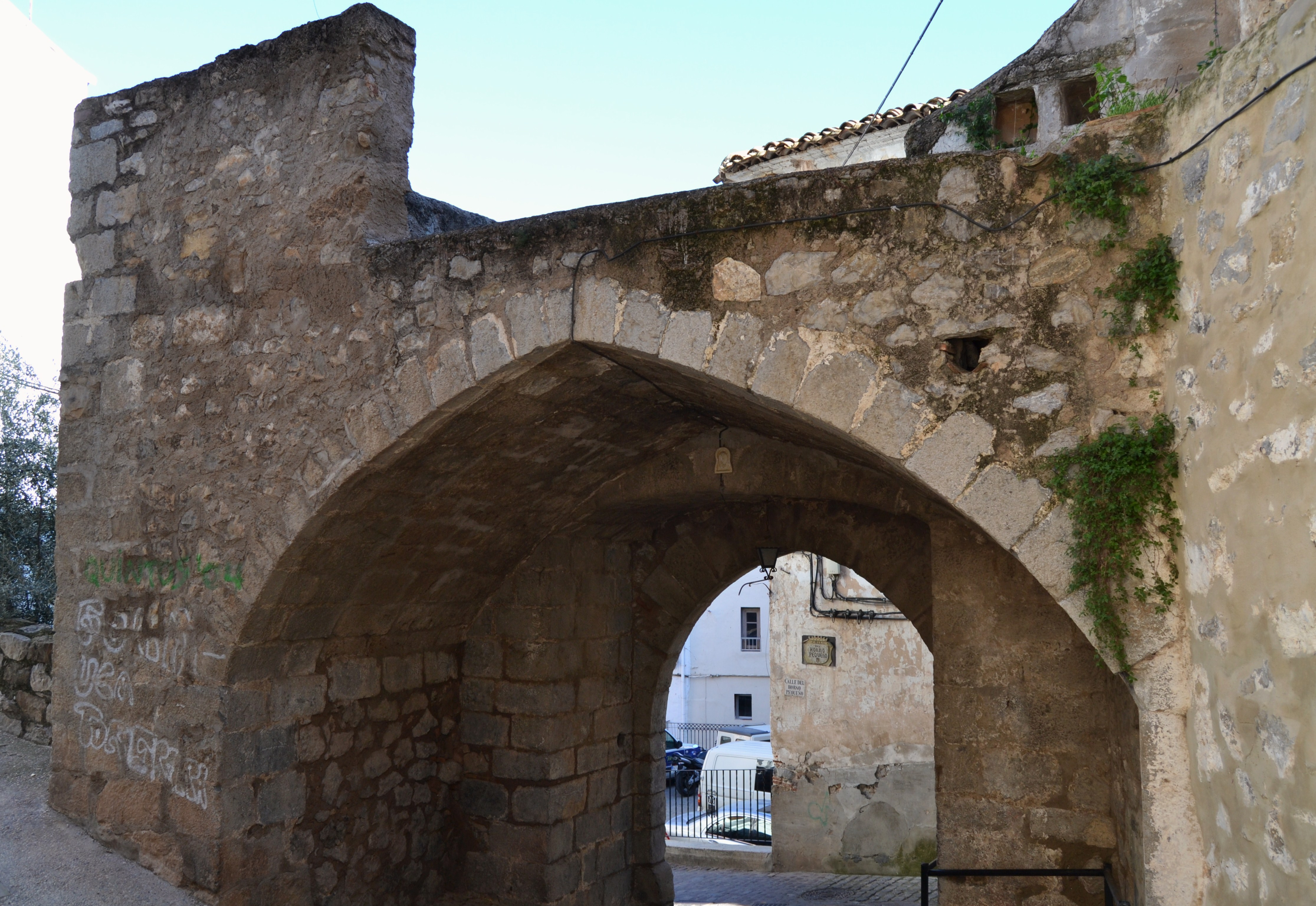 Portal de la Sala, Xèrica.